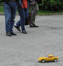 Radio controlled model, a Saab Sonett II. Model, picture, scan, upload: MH 11:15, 2005 Jan 28 (UTC)